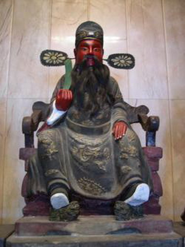 หลิ่มไท่ซือ